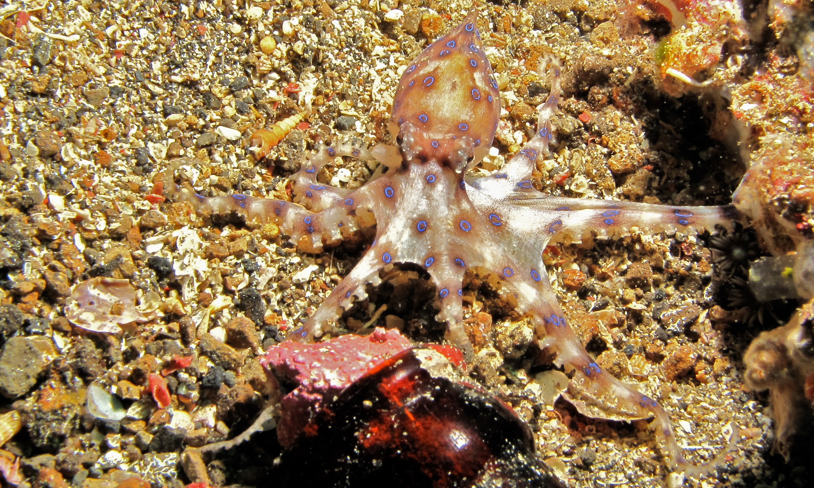 Tanjung Kubur, Lembeh Strait, Sulawesi, INDONESIA